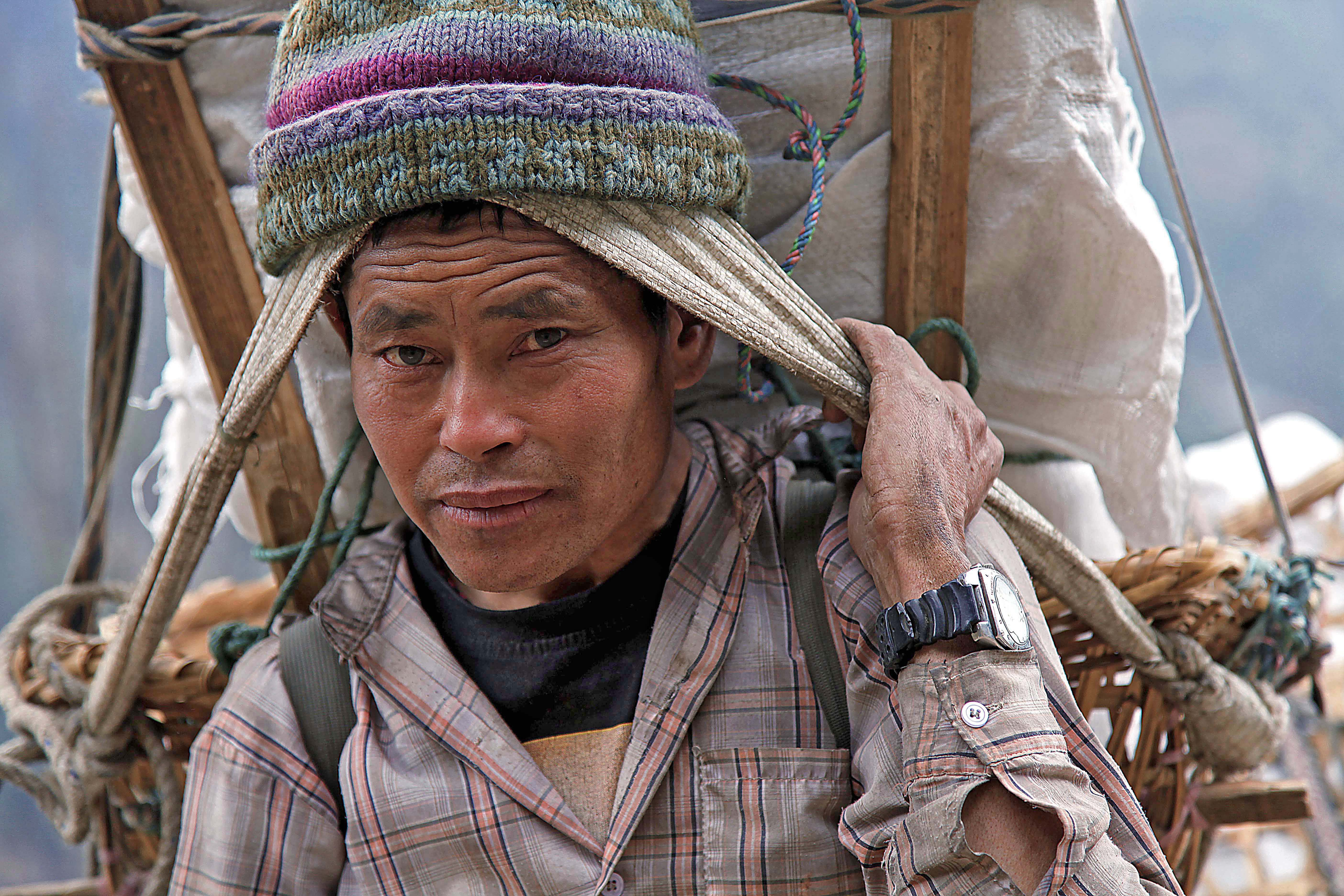 Sherpa in Nepal